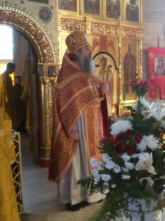 Отец Иосиф Ильницкий произносит проповедь в день жён-мироносец